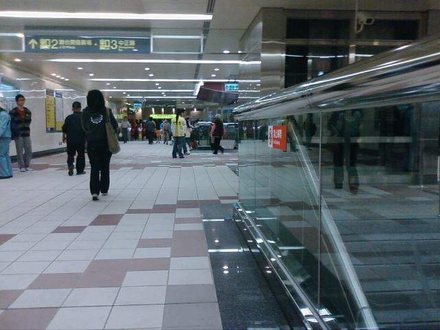 蘆洲站穿堂層。